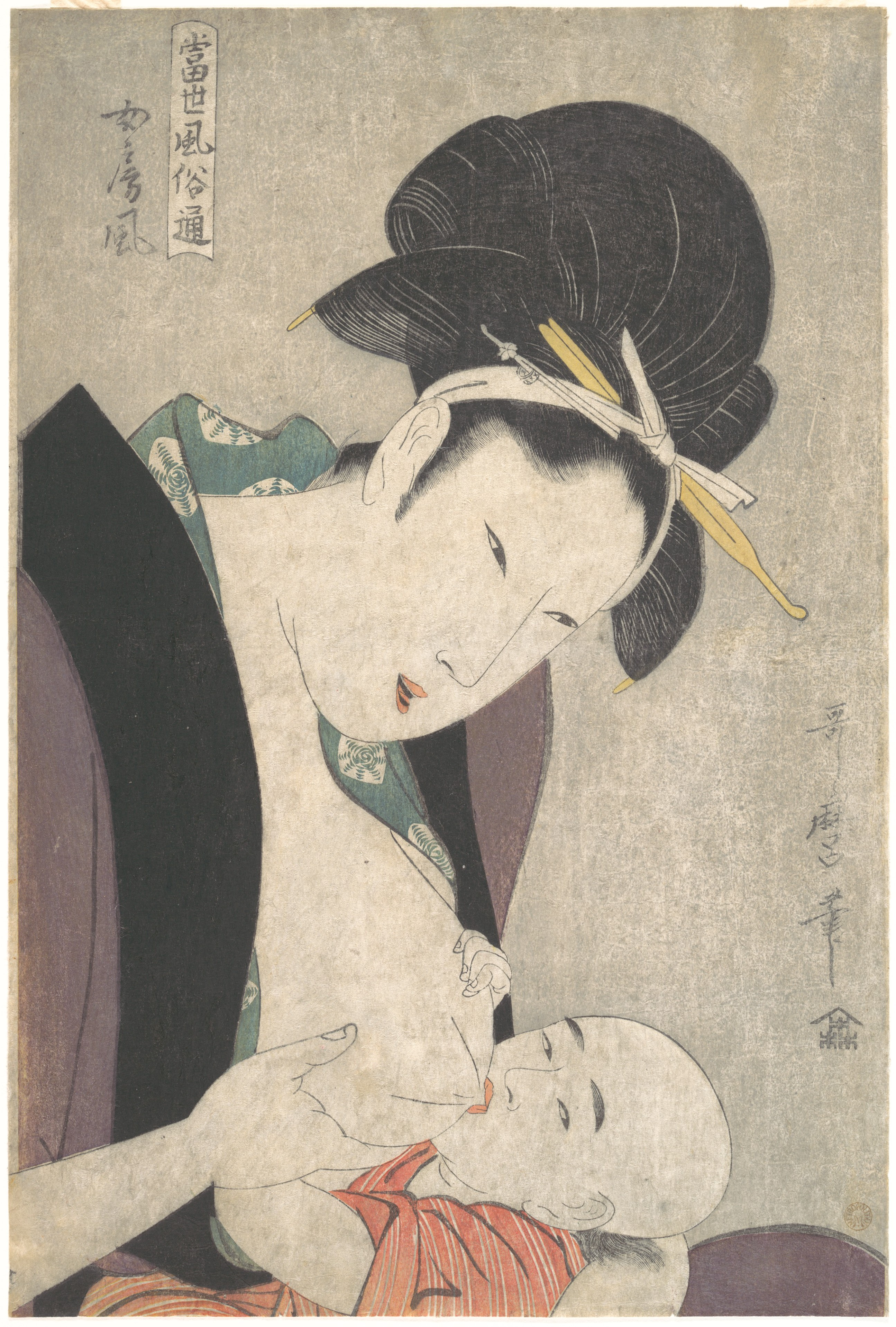 Japan; Print; Prints